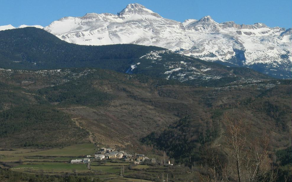 Vista de Esposa desde Sinués